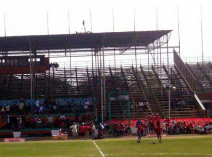 Independence Stadium in Lusaka, Zambia